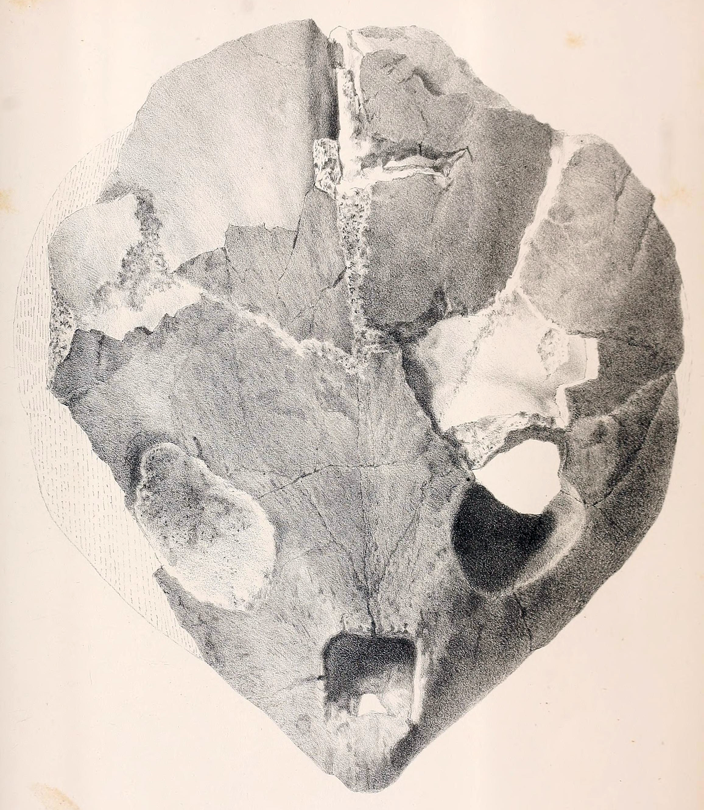 Euclastes platyops skull.